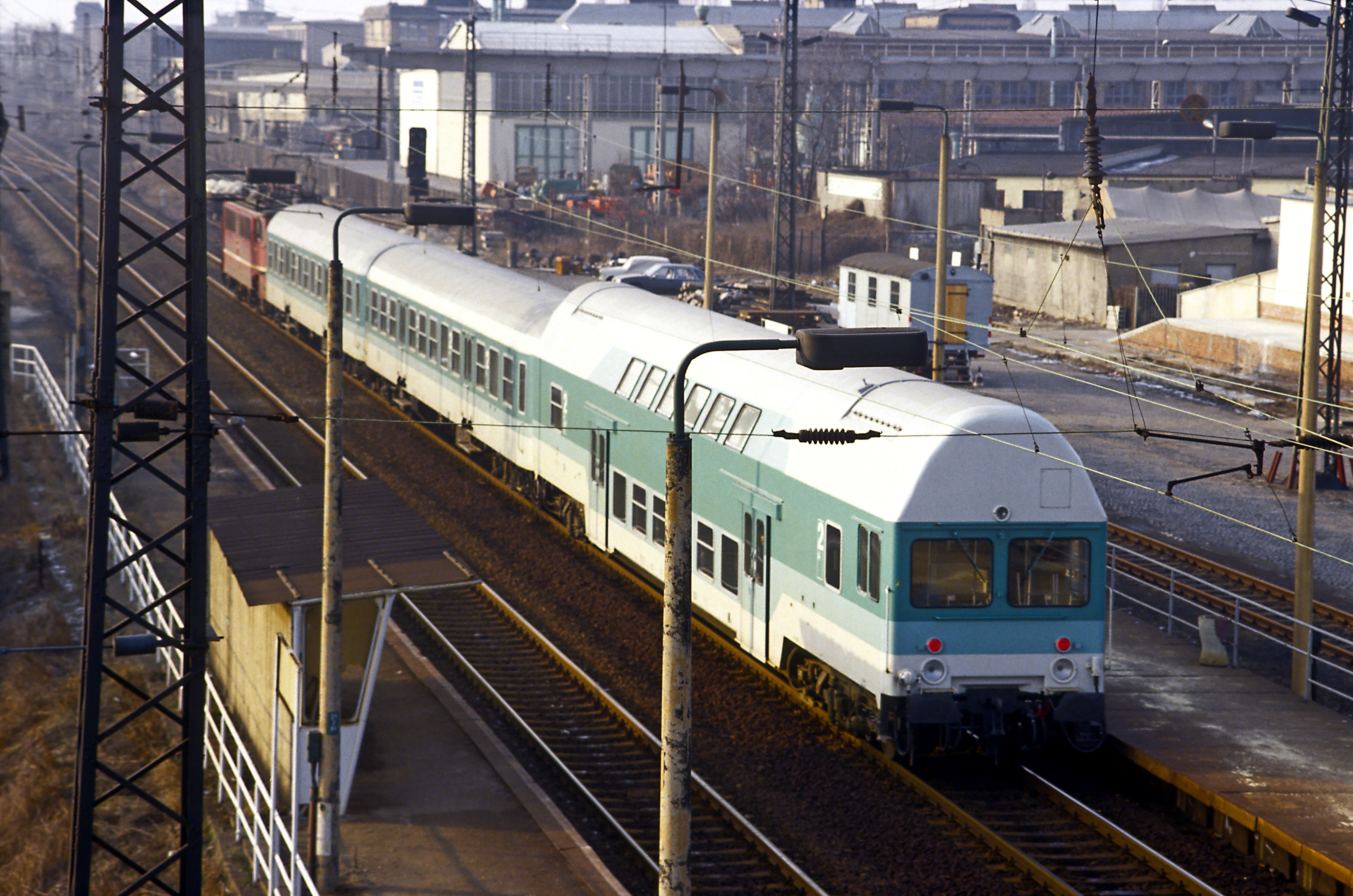 Modernisierungsprototypen im Erprobungseinsatz. S-Bahn-Linie B, Wurzen–Leipzig